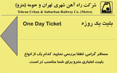 1 günlük bilet